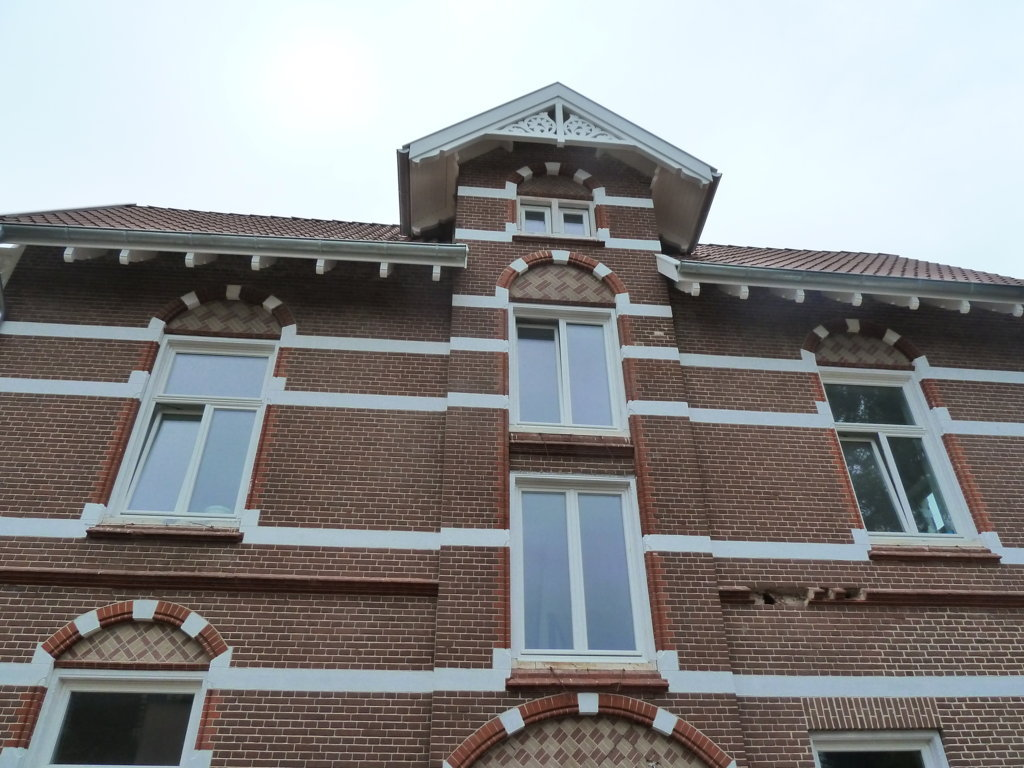 Sanierung Villa Rick, Nordhorn (Denkmalschutztag September 2013)